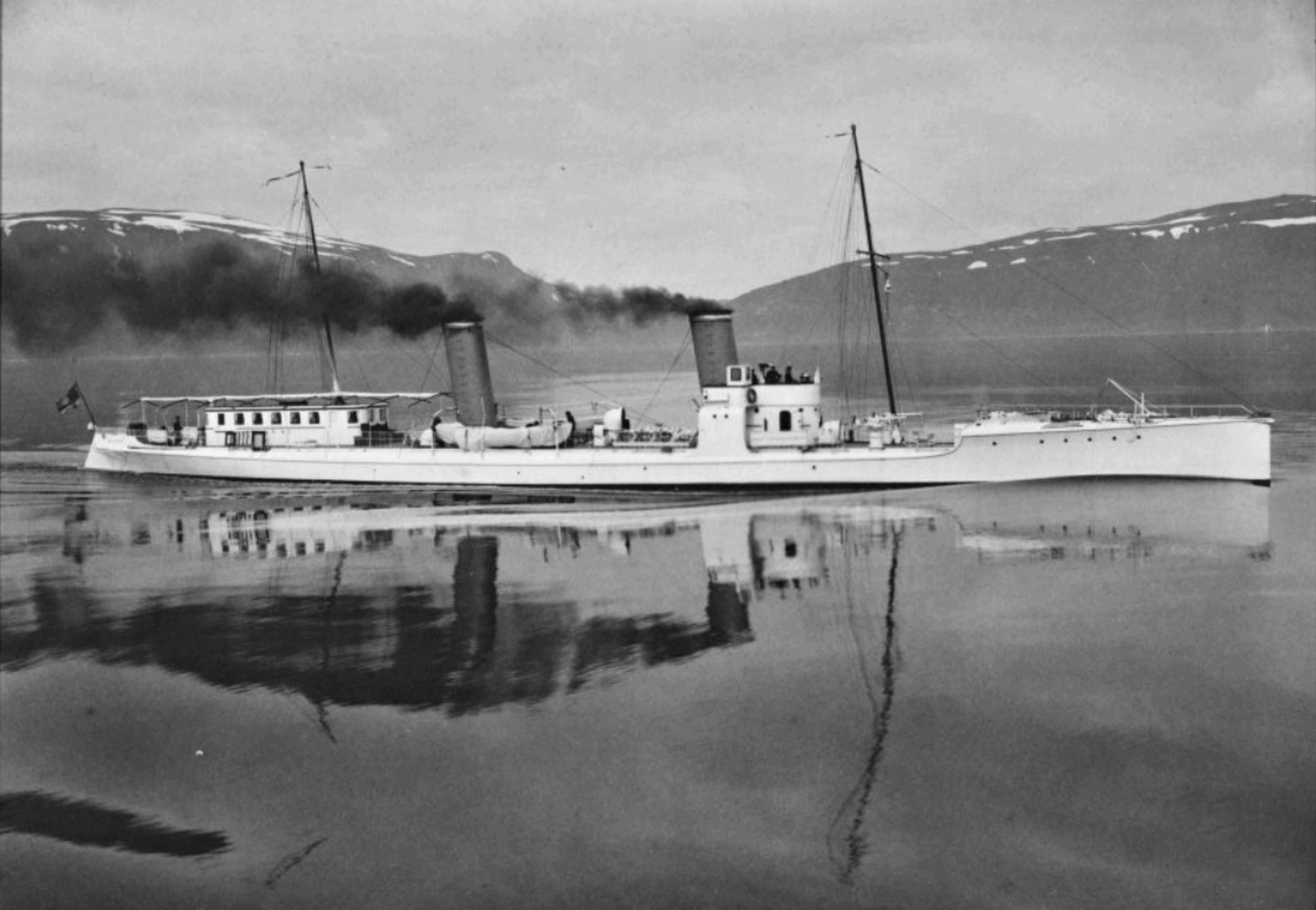 Das Depechenboot Sleipner zur kaiserlichen Jacht Hohenzollern im Lijngenfjord.